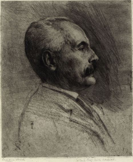 Hermann Struck [hss. Signatur mit Bleistift] b) Bildnis Prof. Erich Schmidt. [hss. mit Bleistift] c) 1886 o [hss. mit schwarzer Tinte] d) Universitäts-Bibliothek Berlin [Stempel]